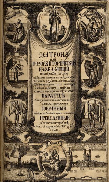 Qеатронъ Историческій, перев. съ Латинскаго іеромонахомъ Гавріиломъ Бужинскимъ. Напеч. въ С.Петербурге, 1724 года